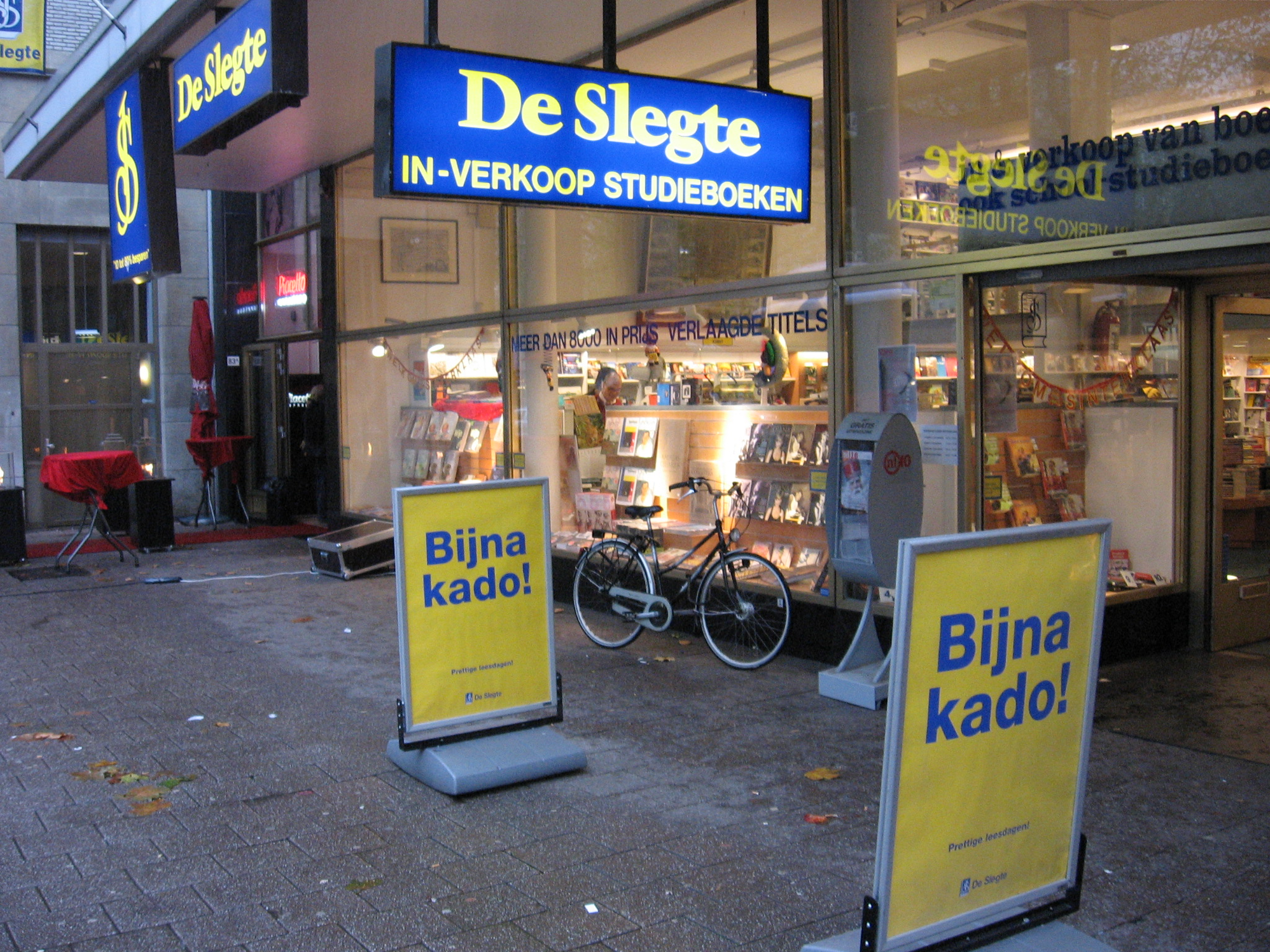 Voormalige boekhandel "De Slegte", Coolsingel, Rotterdam